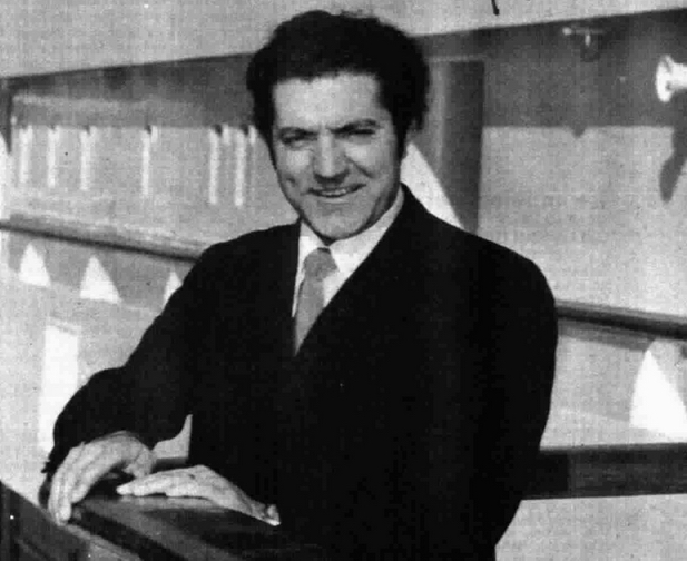 Italian tenor Ottavio Garaventa